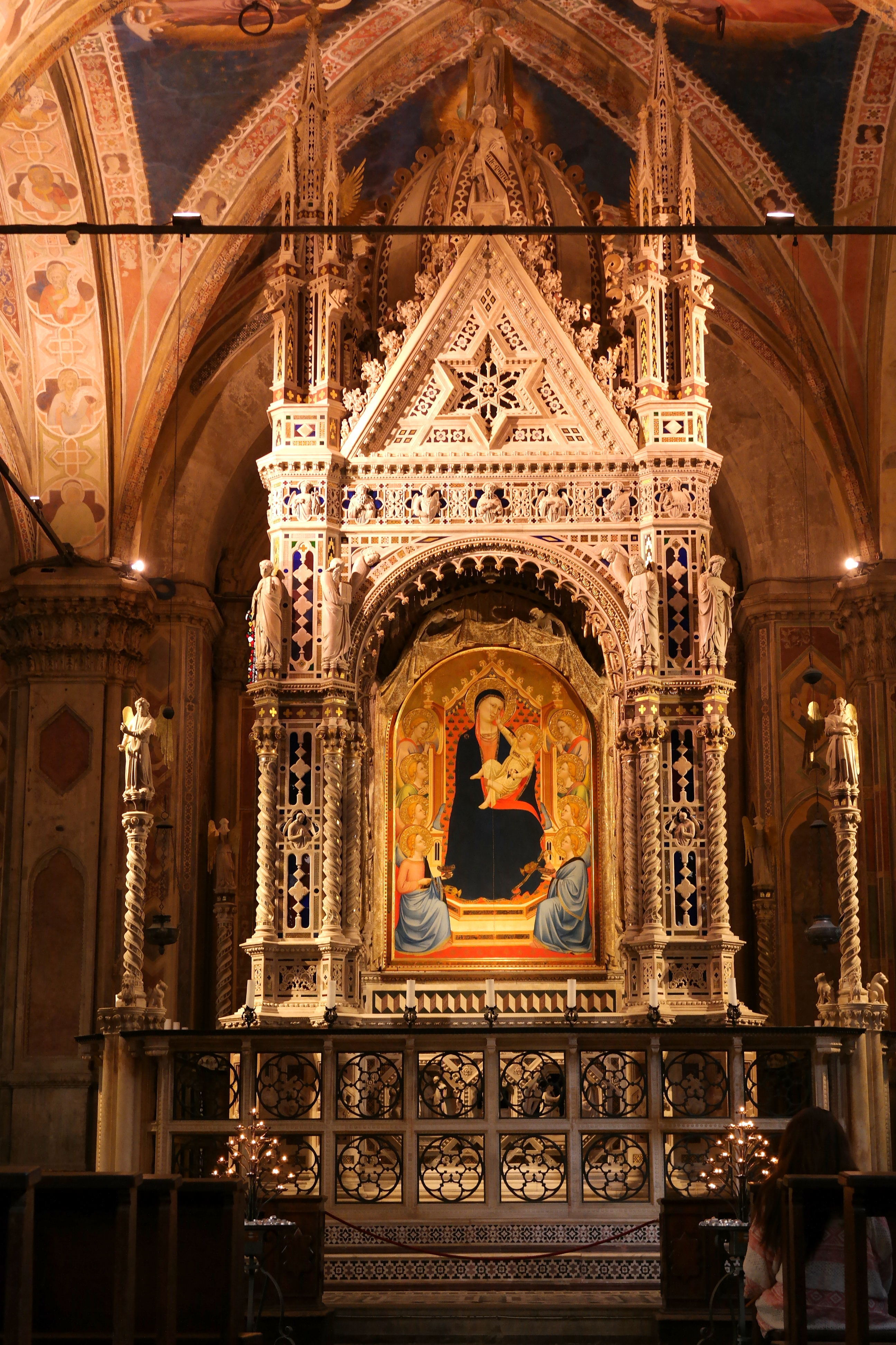 Il tabernacolo dell'Orcagna, all'interno del quale è inserita la Madonna con il Bambino in trono di Bernardo Daddi, nella Chiesa di Orsammichele a Firenze